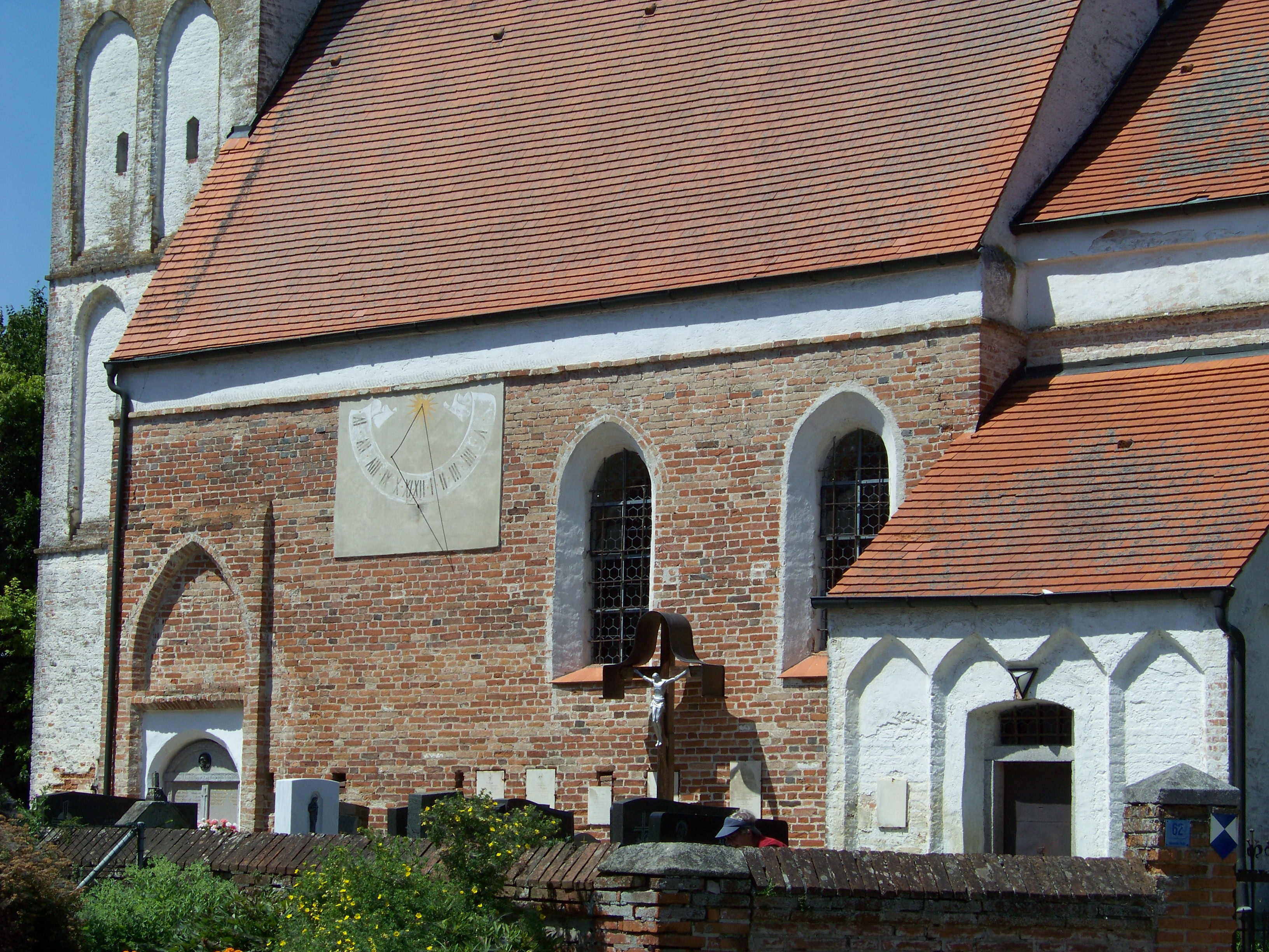 Stadt Landau a. Isar; Niederbayern.Usterling, Mamminger Straße 62. Katholische Filialkirche St. Johannes der Täufer. gestaffelter Bau in Blankziegelmauerwerk und Sattelturm, spätgotisch, Anfang 16. Jahrhundert; mit Ausstattung. Einfriedung, Ziegelmauer mit Granitabdeckungen auf den Pfeilern und schmiedeeisernen Toren, spätes 19. Jahrhundert. Die Südseite des Langhauses mit Sakristei.